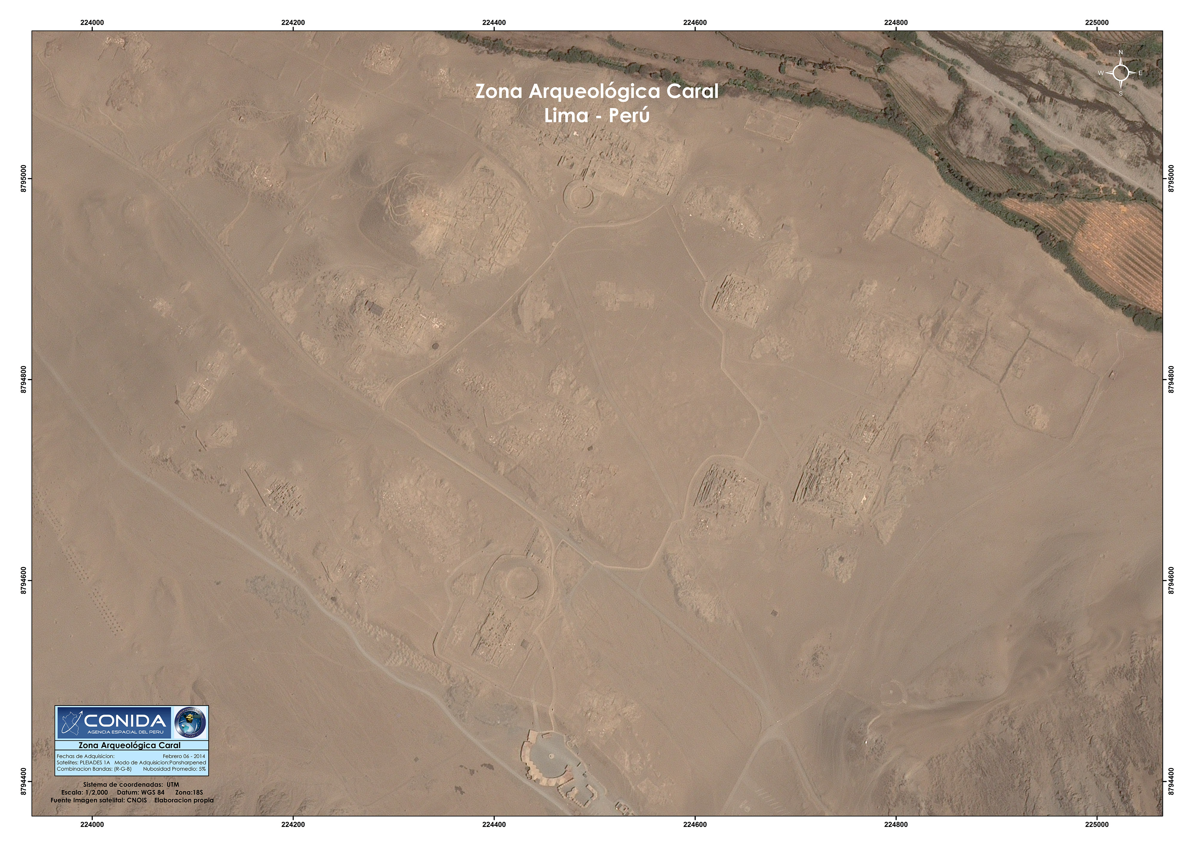 Sitio arqueológico de Caral. Imagen del PerúSAT-1